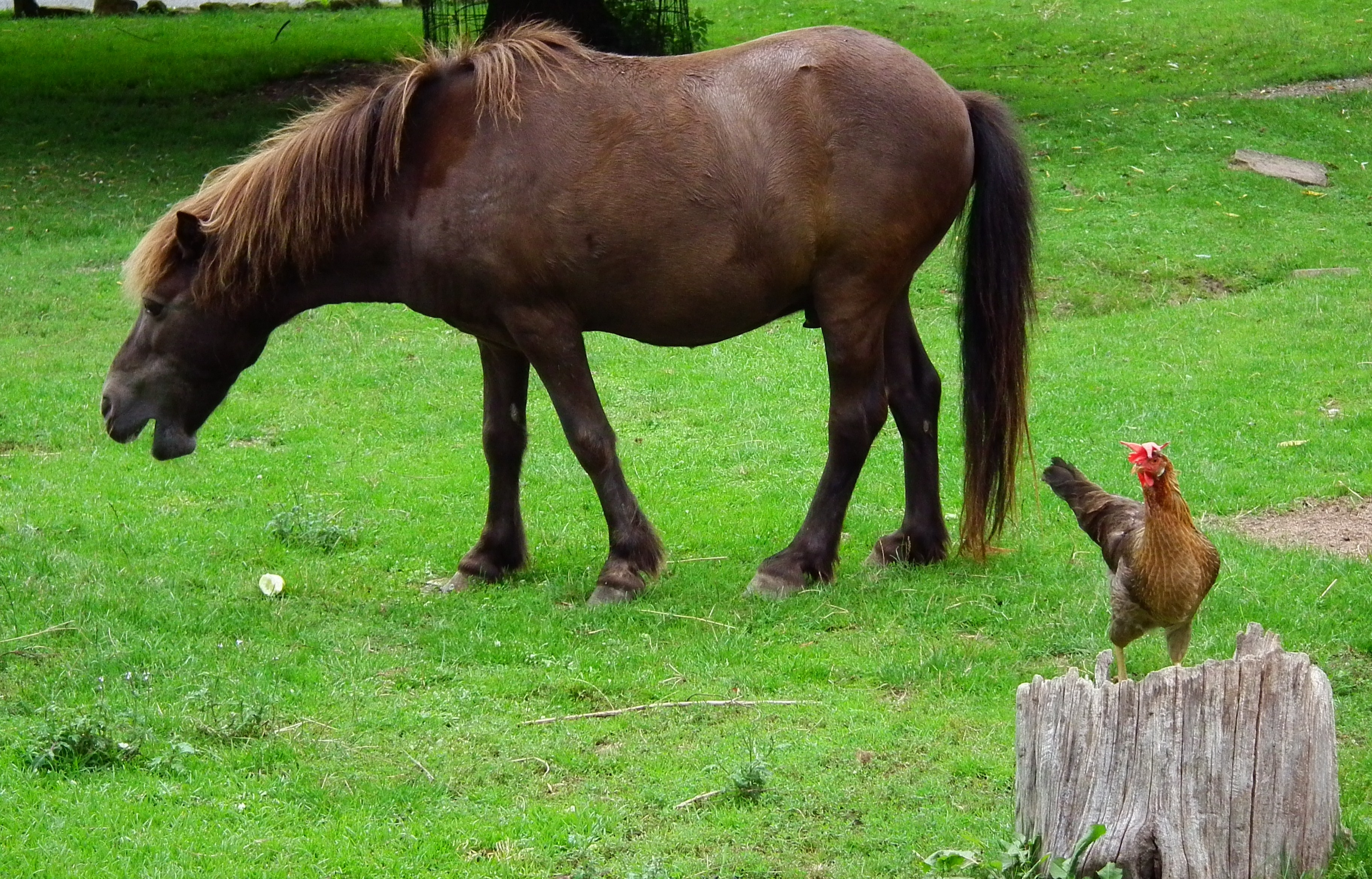 Shetlandponyhengst und Huhn im Kleintierpark Bad Schönborn (Baden-Württemberg, Deutschland)